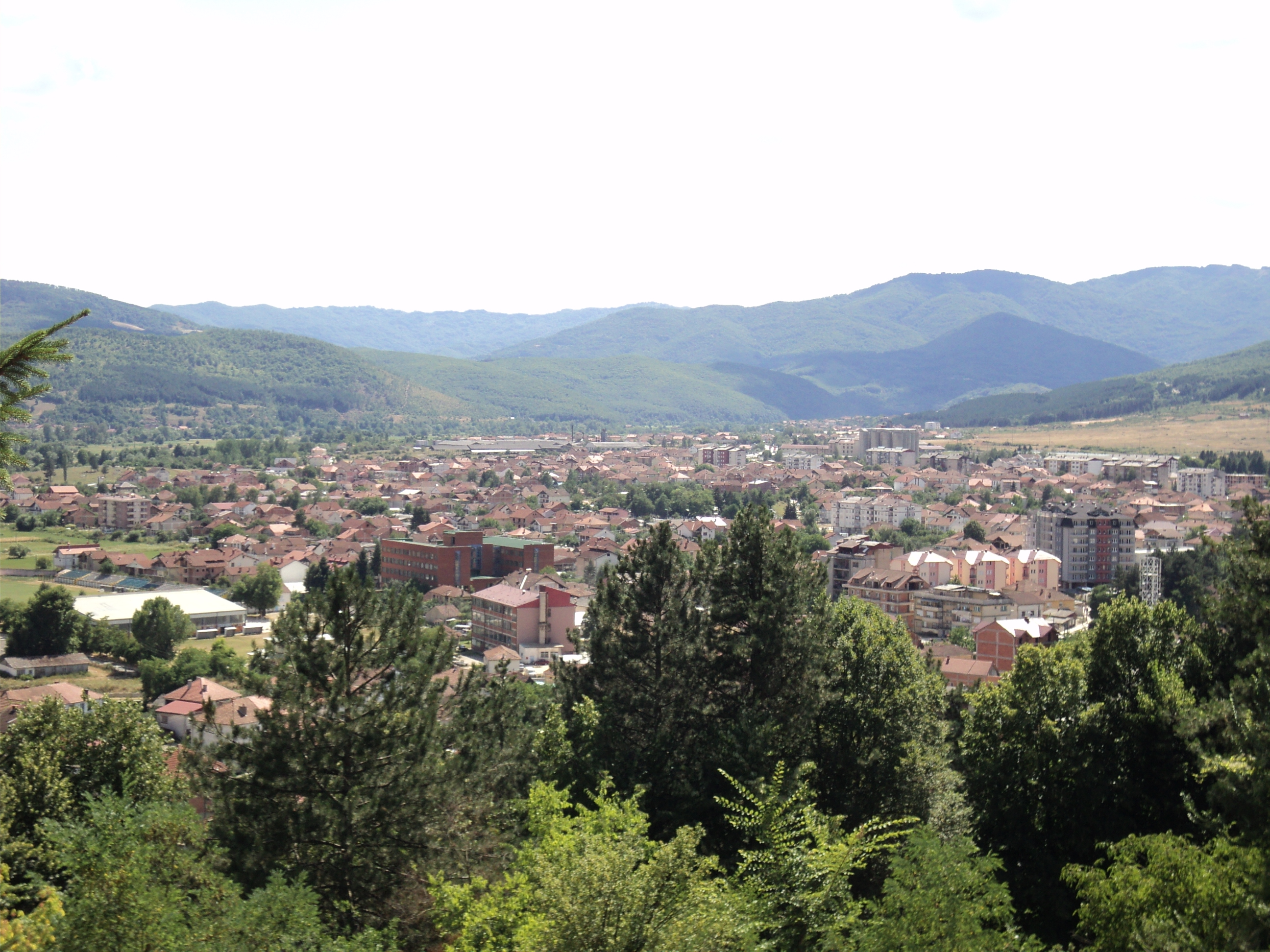 Pogled na južni deo grada Kičeva sa vrha brda Kitino kale